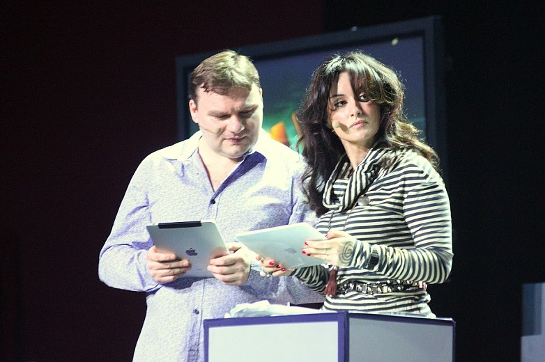 Alexander Plyushchev and Tina Kandelaki (Runet Prize 2010)